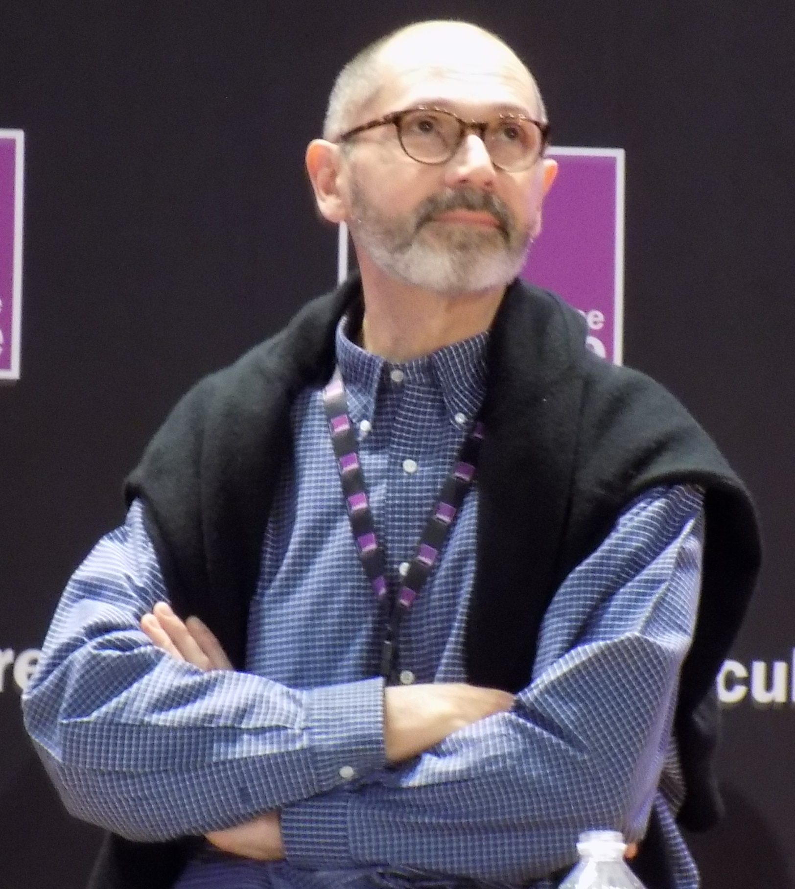 Christophe André lors du forum « L’année vue par les sciences » organisé par France Culture le 13 février 2016